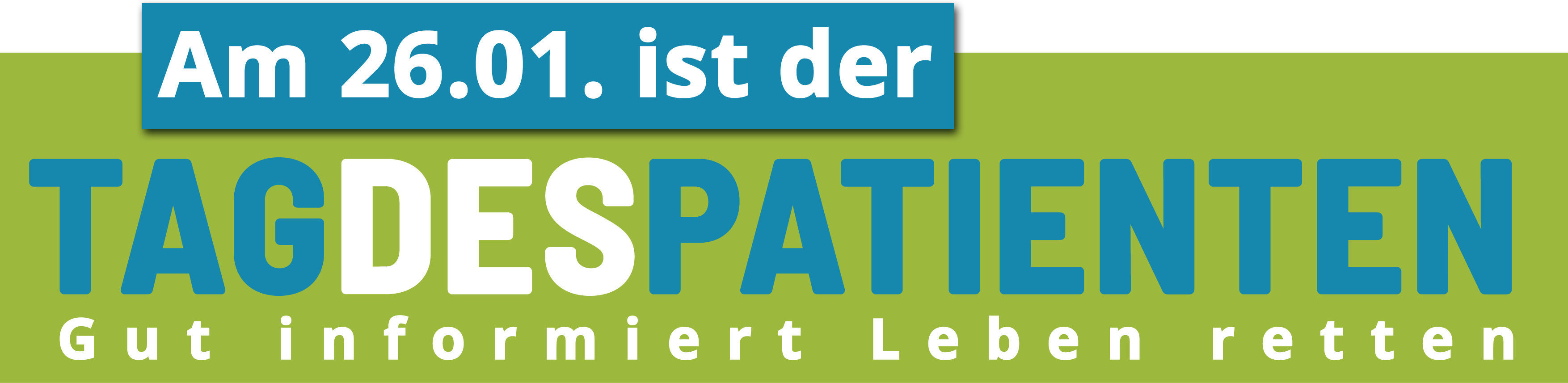 Tag des Patienten Logo